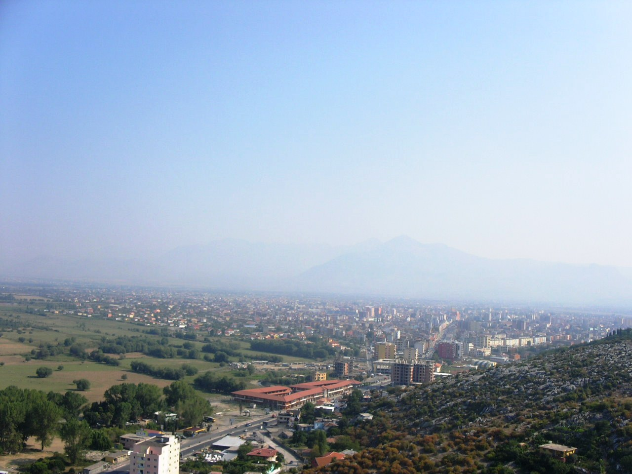 Shkodra nga Kalaja